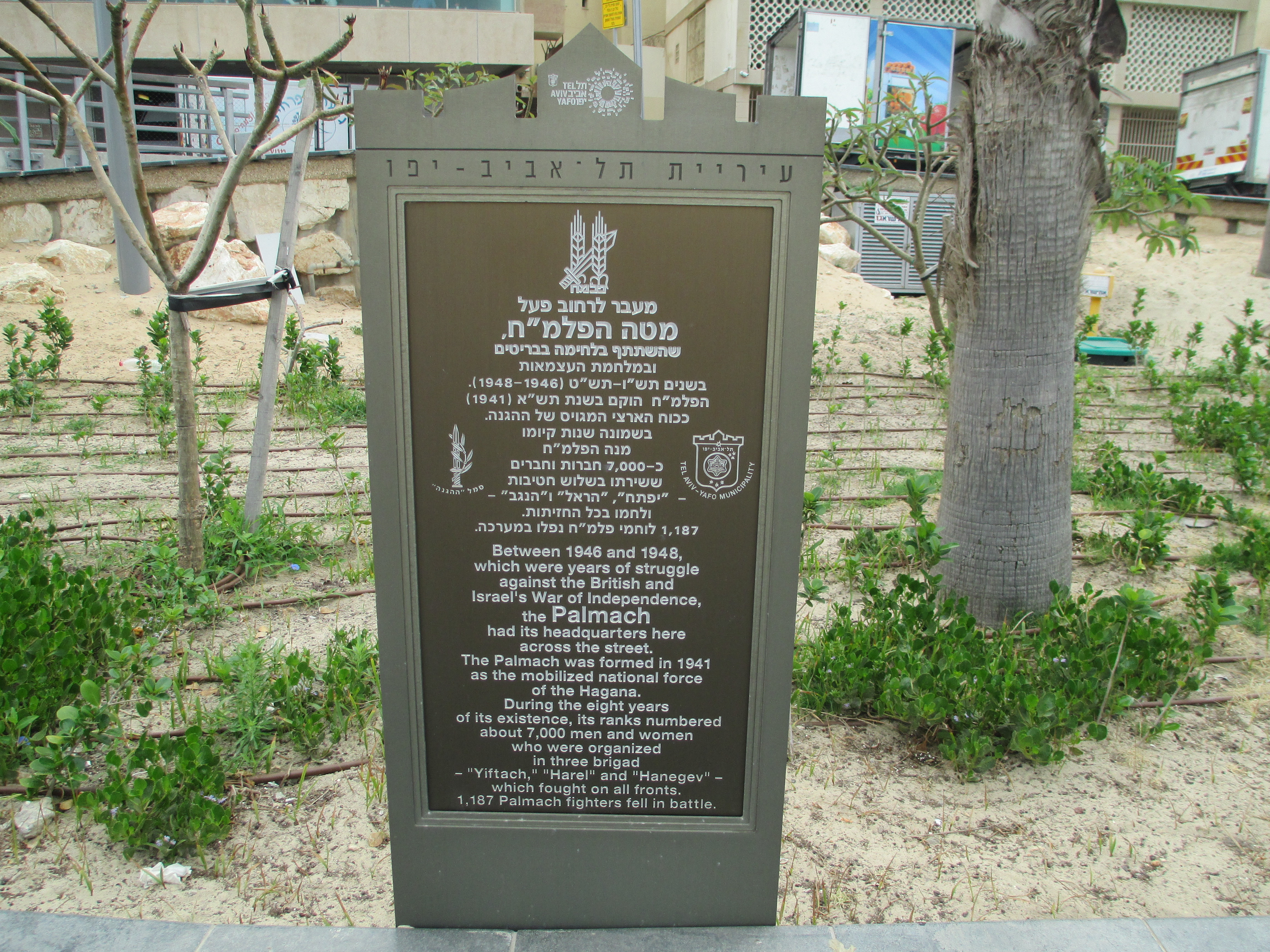 לוחית זיכרון למטה הפלמ"ח בתל אביב בטיילת הרברט סמואל מול שגרירות צרפת